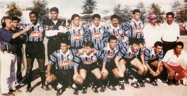 1o time profissional do Porto